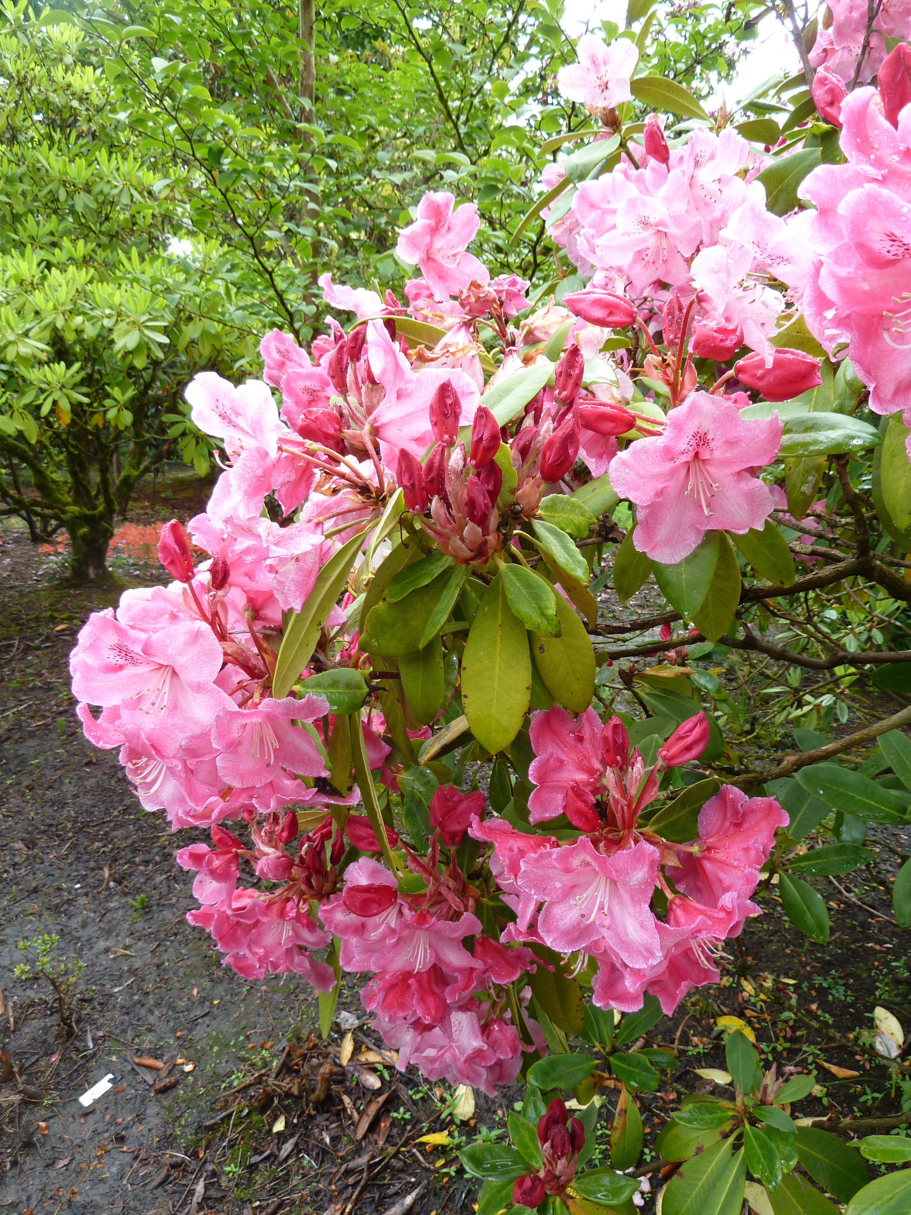 Rhododendron 'Dutch Master' at Crystal Springs Rhododendron Garden in Portland, OR